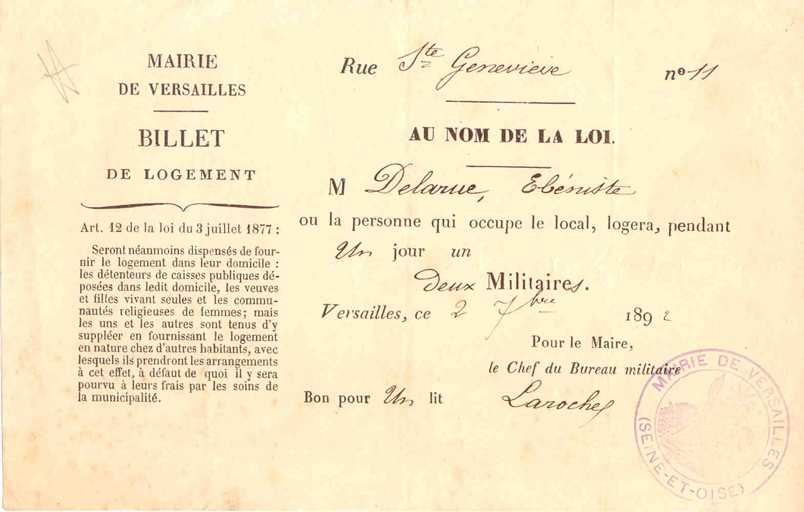 Billet de logement chez l'habitant pour deux militaires, Versailles 1892.